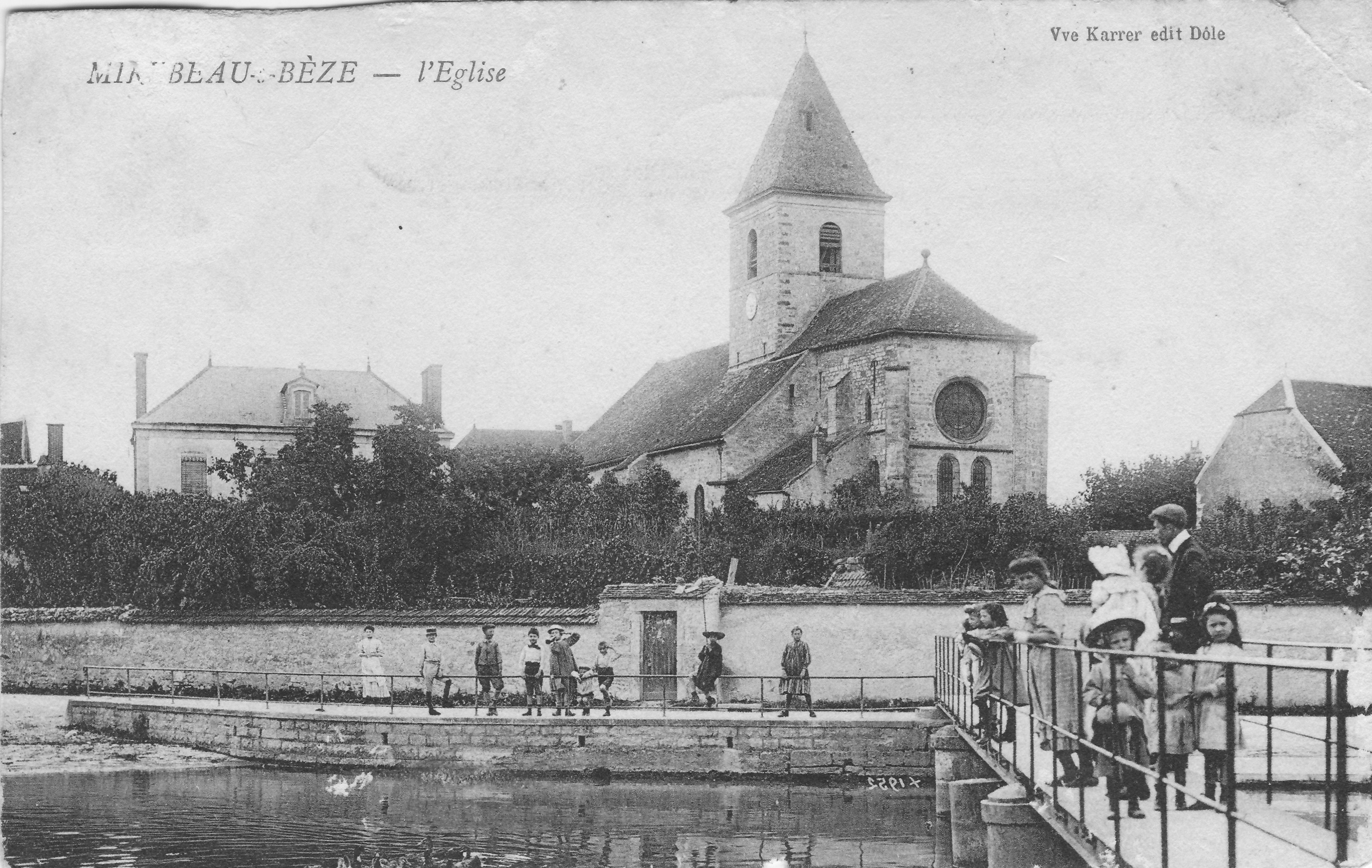 Carte postale ancienne montrant l'église de Mirebeau-sur-Bèze vers 1911